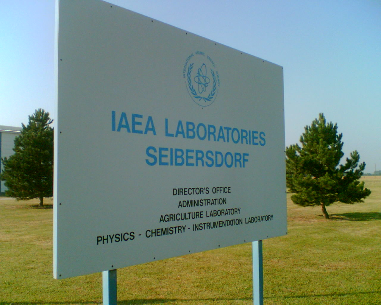 Hoheitsschild der IAEO im Forschungszentrum Seibersdorf, Österreich. Von mir selbst (Mitarbeiter der IAEO in Seibersdorf) fotografiert im Juli 2005 (Handy-Kamera). Ich möchte anmerken, dass es sich NICHT um öffentliches Gelände handelt, sondern um durch Zugangskarten restriktives Gebiet. Ich bin zwar der Meinung, dass dieses Bild nichts Kompromittierendes darstellt, ziehe es aber sofort zurück, sollte dies irgendwie gesetzliche Probleme mit sich bringen. Ausdrückliches Fotografieverbot herrscht im Gelände NICHT.